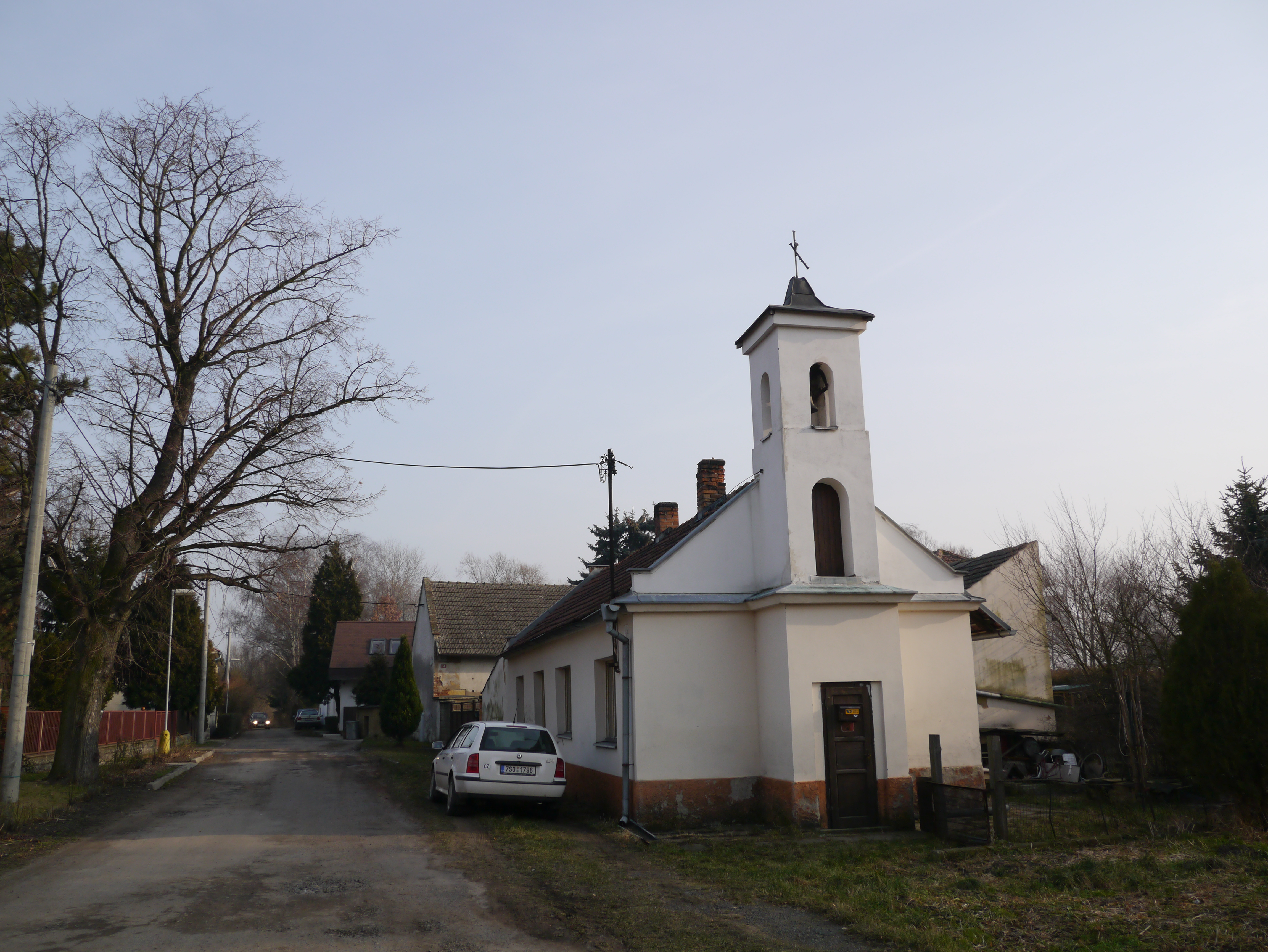 Nedomice - zvonička